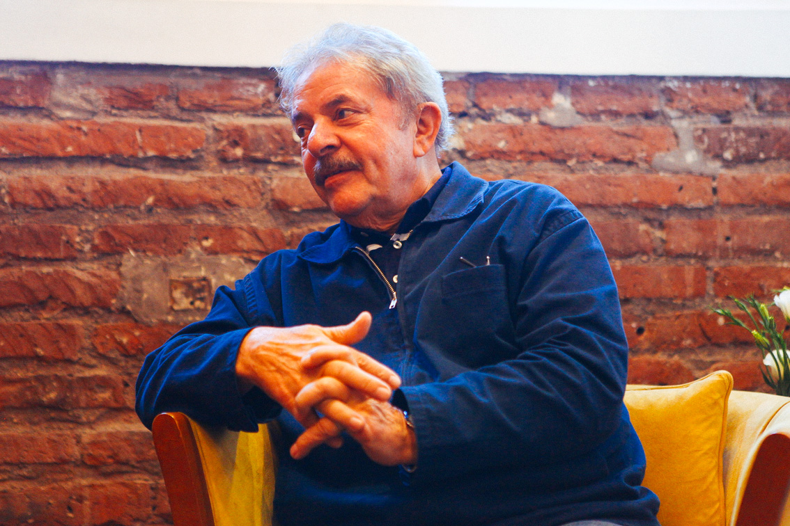 Presidente Lula da Silva visita comando de Michelle Bachelet 26/11/2013 Presidente Lula da Silva visita comando presidencial de Michelle Bachelet en 2013.